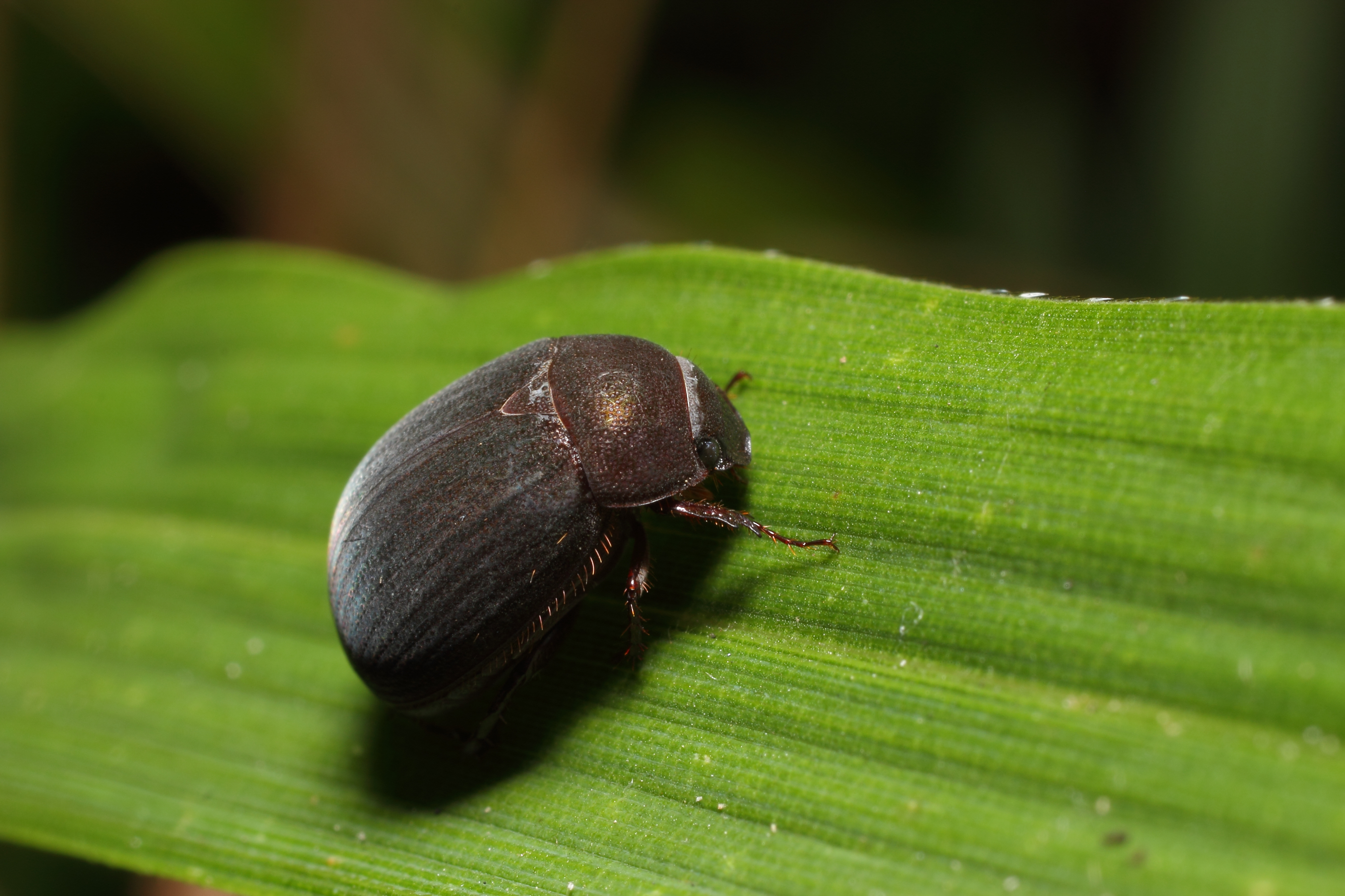 Maladera japonica.